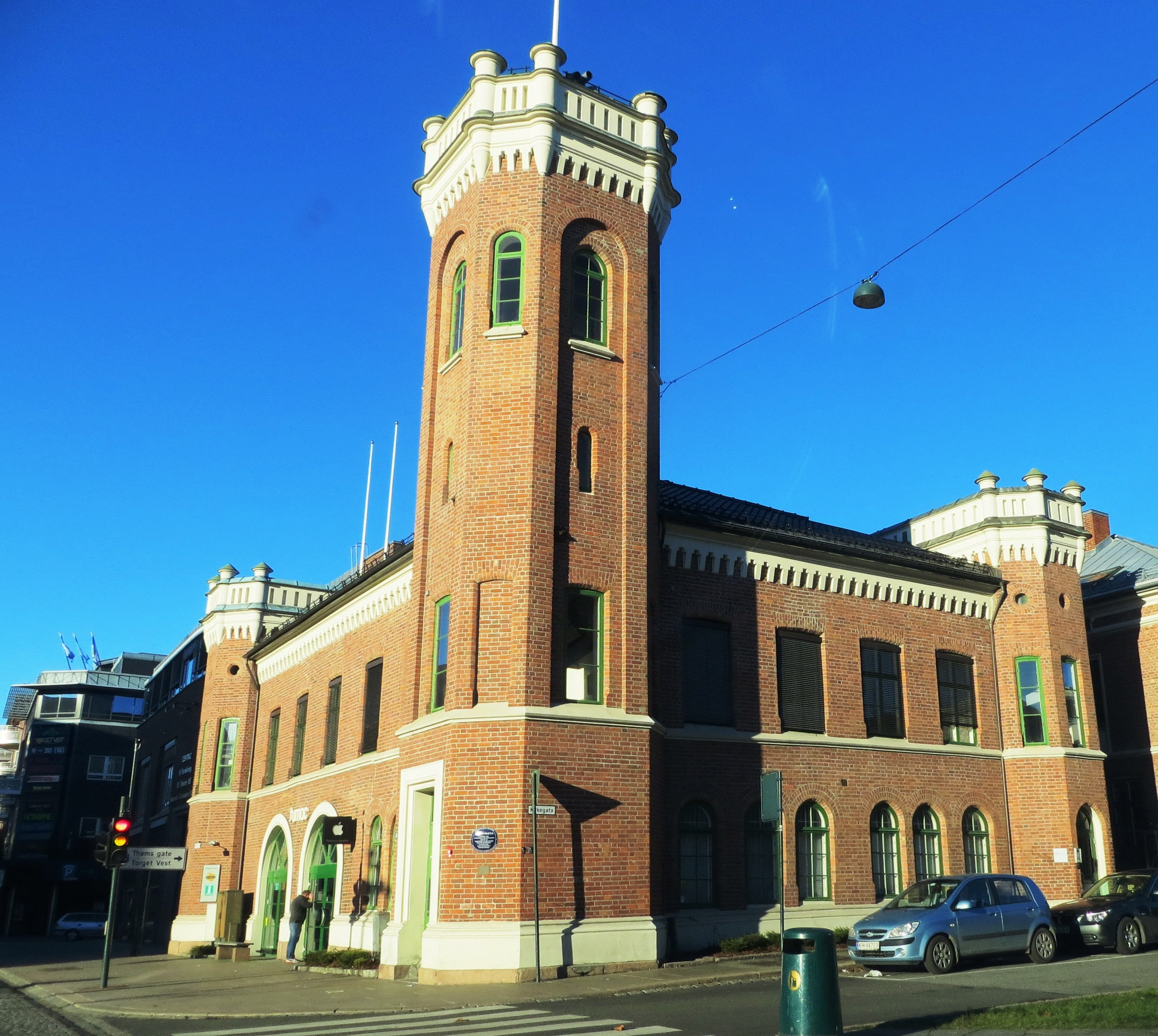 Bygård i Haugesgate på Bragernes i Drammen. Området er markert med verneverdi / vernestatus hos Riksantikvaren (